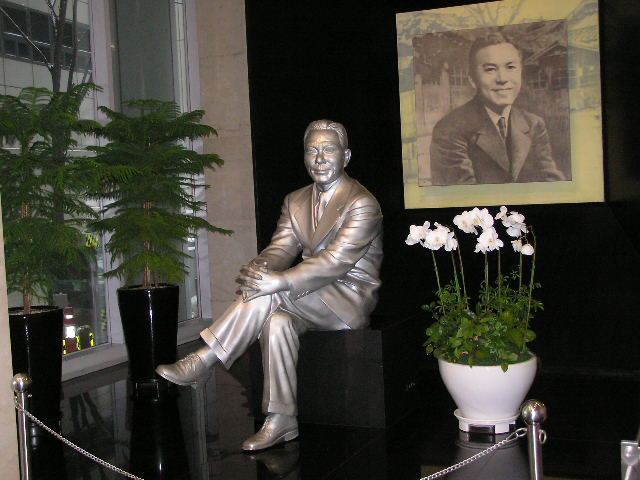 동아일보 사주, 언론인 인촌 김성수 동상